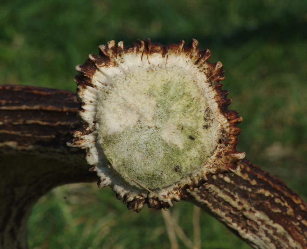 Petschaft am Geweih (Elch, Stangengeweih, 4-ender, Pravirsulis, Litauen)